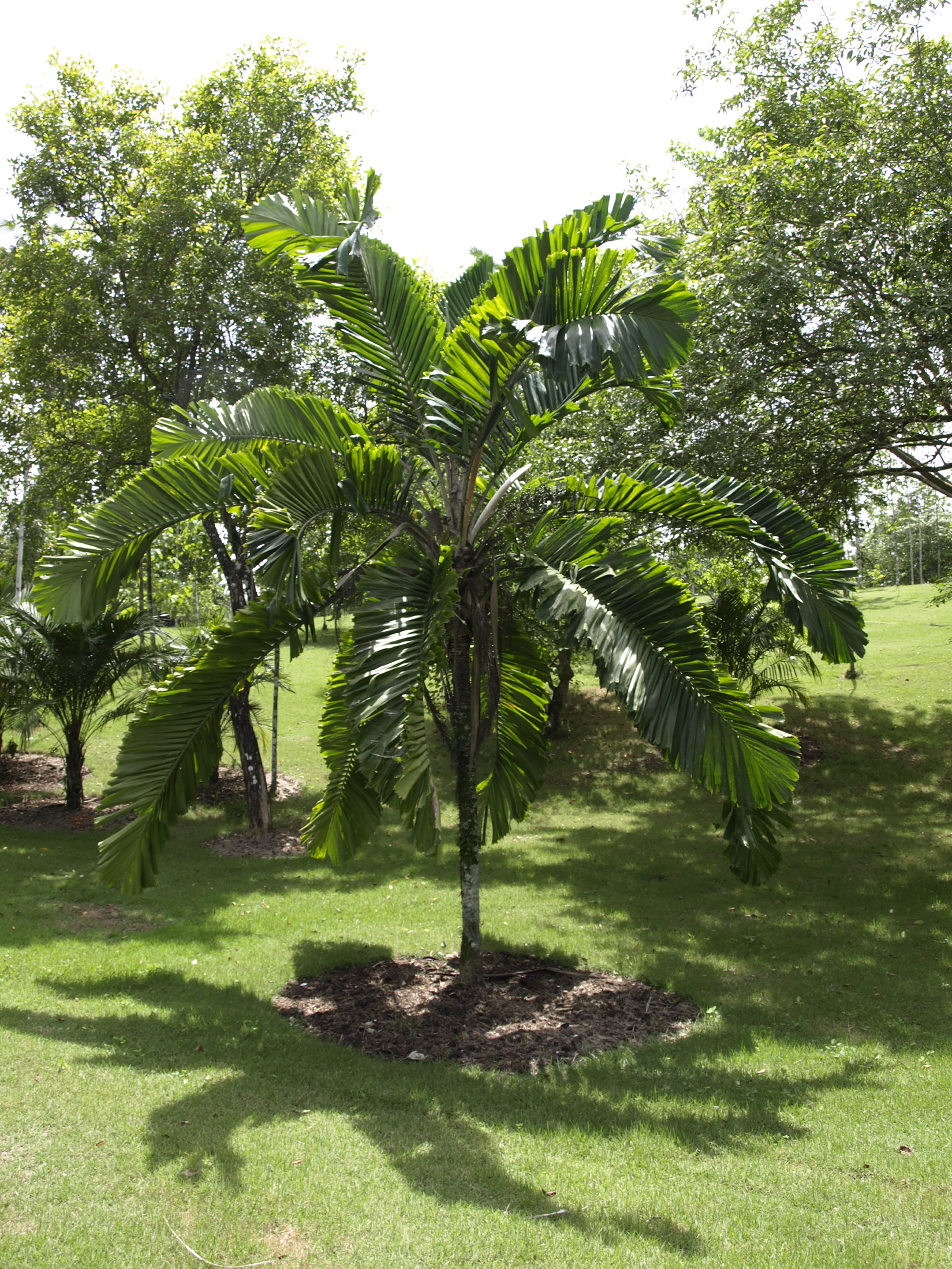 cultivated, Jardin Botanico Nacional 'Rafael M. Moscoso' Santo Domingo, Dominican Republic.